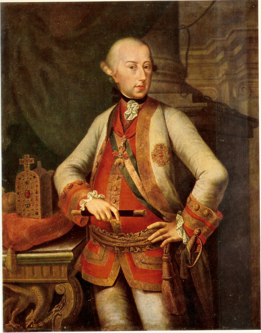 Porträt von Kaiser Joseph II. von Habsburg